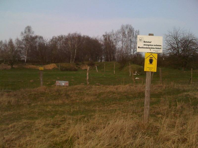 Südlicher Grenzbereich des Naturschutzgebietes Bockhorst bei Güstrow (Mecklenburg-Vorpommern).